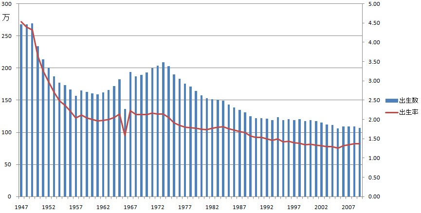 日本の1947年以降の出生数と合計特殊出生率の推移。左が出生数、右が合計特殊出生率である。